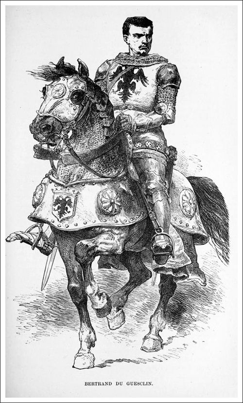 Gravure "Bertrand du Guesclin" par Alphonse de Neuville (1894).